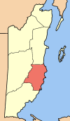 Stann Creek district, Belize